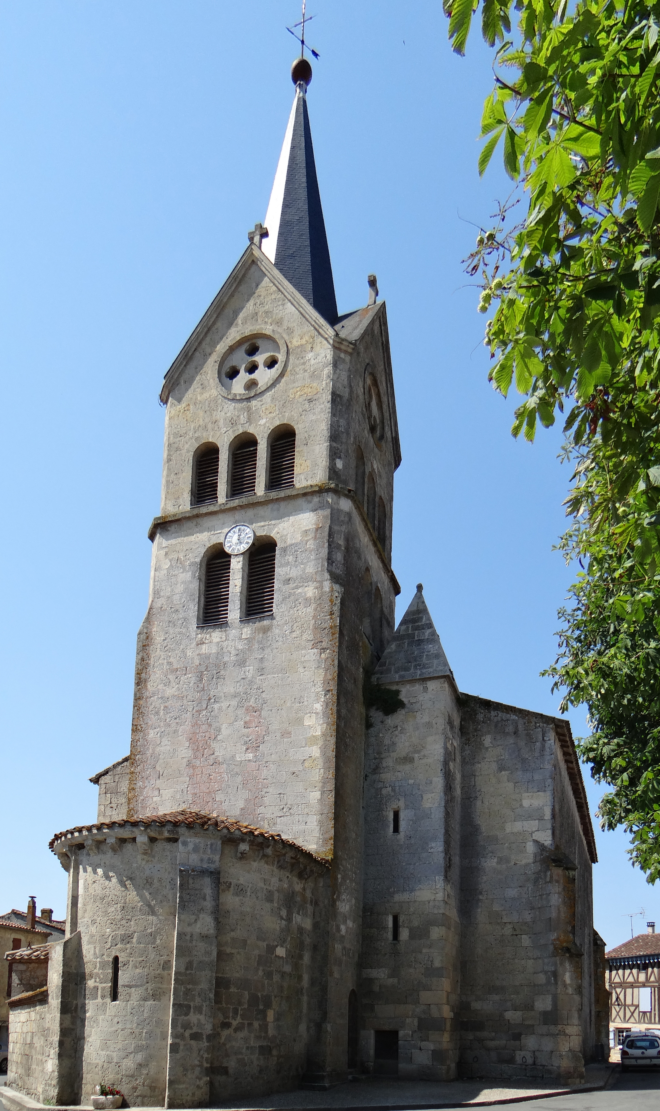 Prayssas - Église Saint-Jean - Chevet et clocher